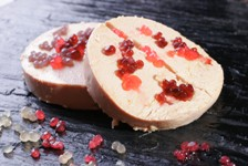 Caviar_de_vénus_foie_gras